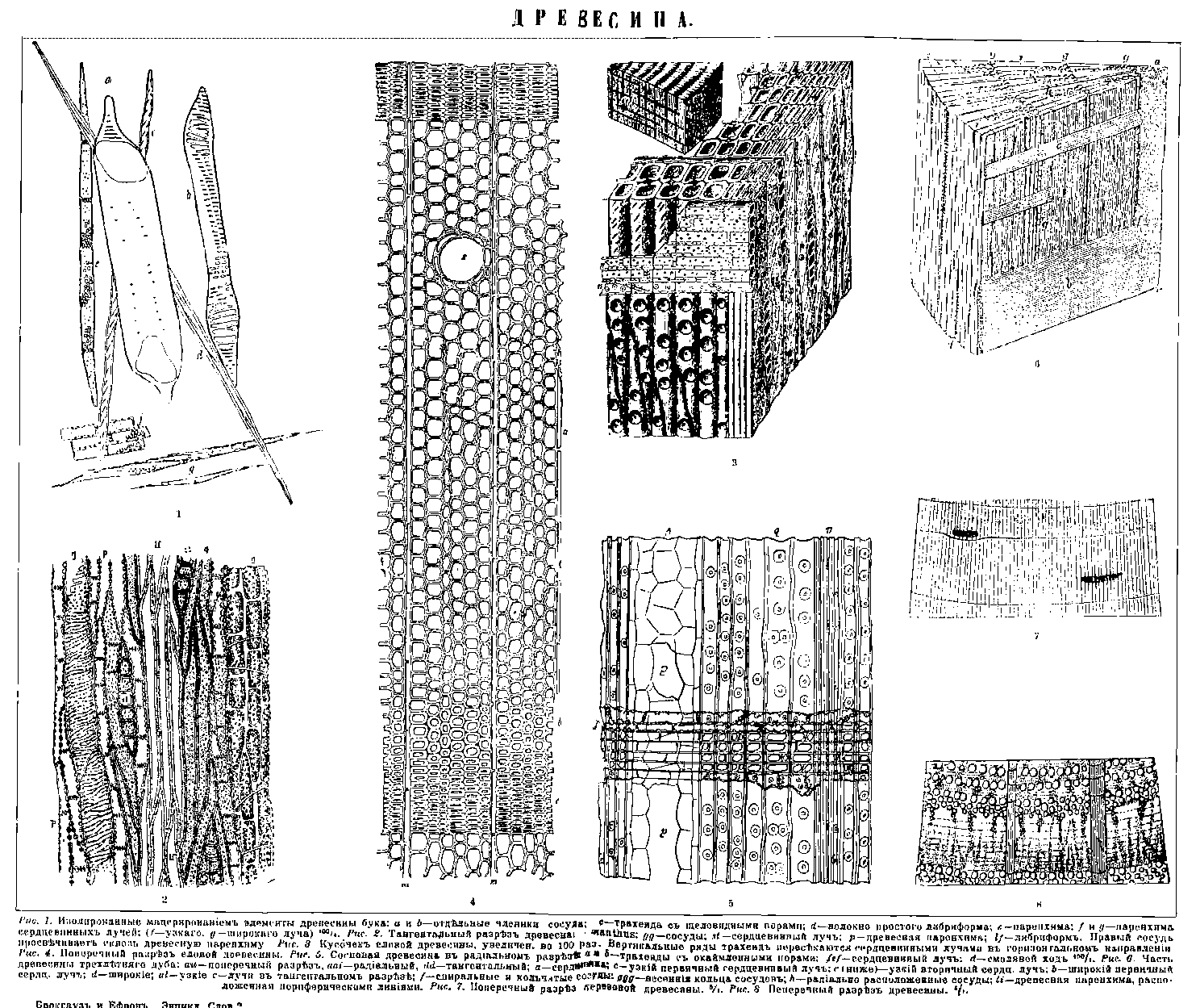 ДревесинаИллюстрация к статье Древесина